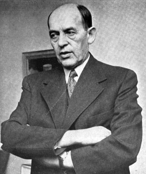 Axel Strand